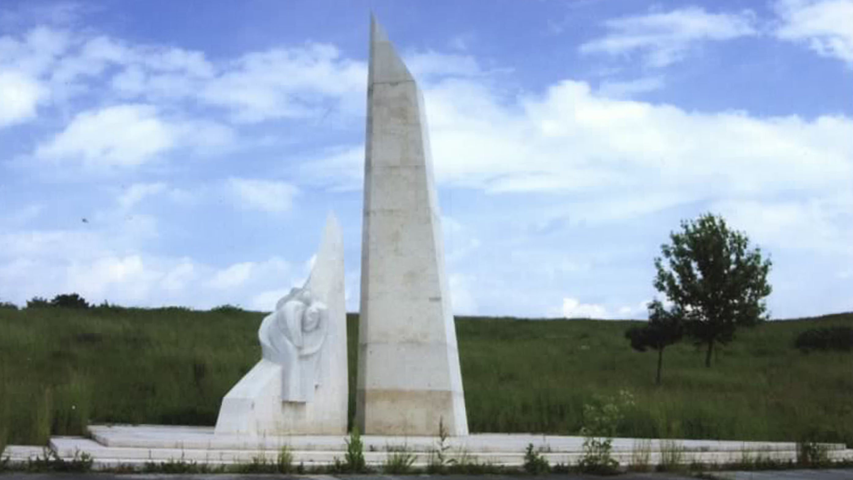 Pamätník SNP v Prievidzi realizoval akademický maliar Pavol Blay v rokoch 1987-1992